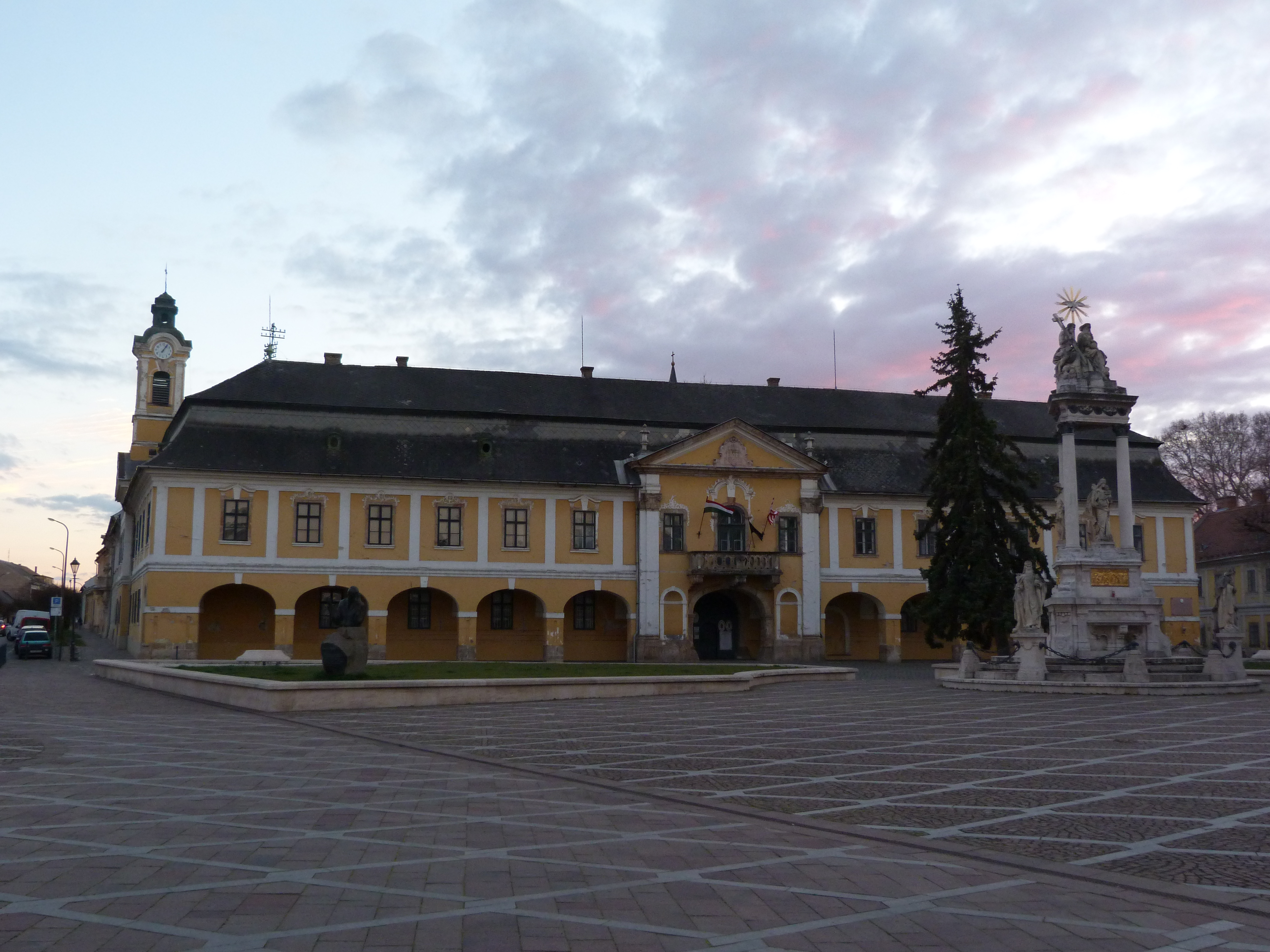 A felvétel 2014. március 19 –én szerdán készült Esztergomban. Szeles, részben borult idő. ©© Derzsi Elekes Andor, Budapest, 2014, A kép és filmfelvételek egészben, vagy részletekben másolását, bármilyen úton történő sokszorosítását és felhasználását a szerző ellenérték nélkül, jogutódjaira is kihatóan megengedi. Az engedély kiterjed a kereskedelmi célú hasznosításra is. Kéri azonban nevének feltüntetését a felhasználás során. A Metapolisz sorozat valamennyi képe és filmje Creative Commons alatti valamint kereskedelmi - for profit - célra is felhasználható. Ajánlott hivatkozás: Derzsi Elekes Andor: Metapolisz DVD line